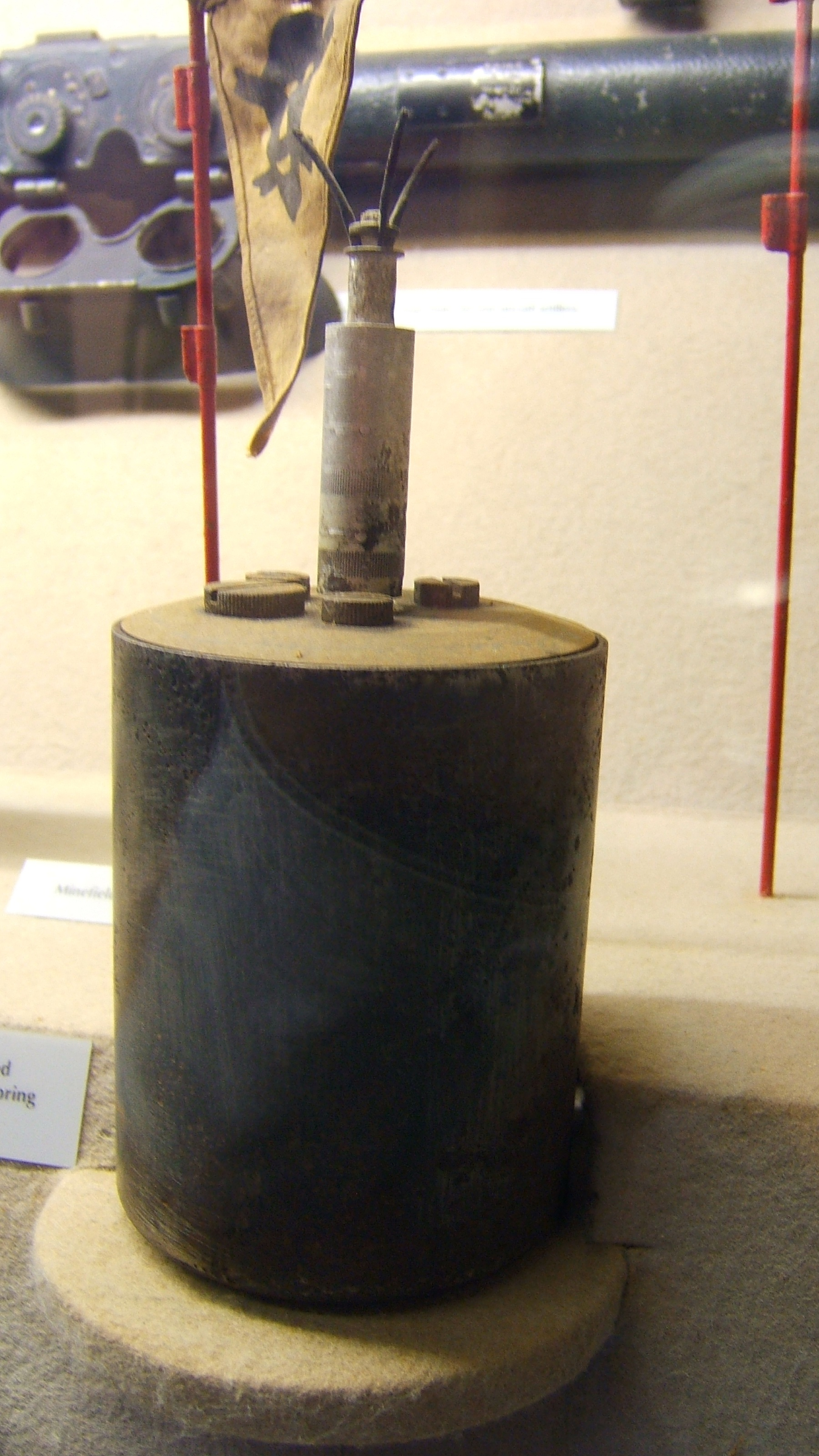 Mine Schrapnel, Musée dans le château Elizabeth qui garde la ville de Saint-Hélier depuis le début du XVIe siècle à Jersey. Note:- it is commonly referred to as the "S-mine".